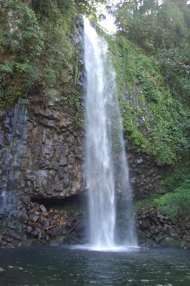 Air terjun Lembah Anai, Sumatera Barat.